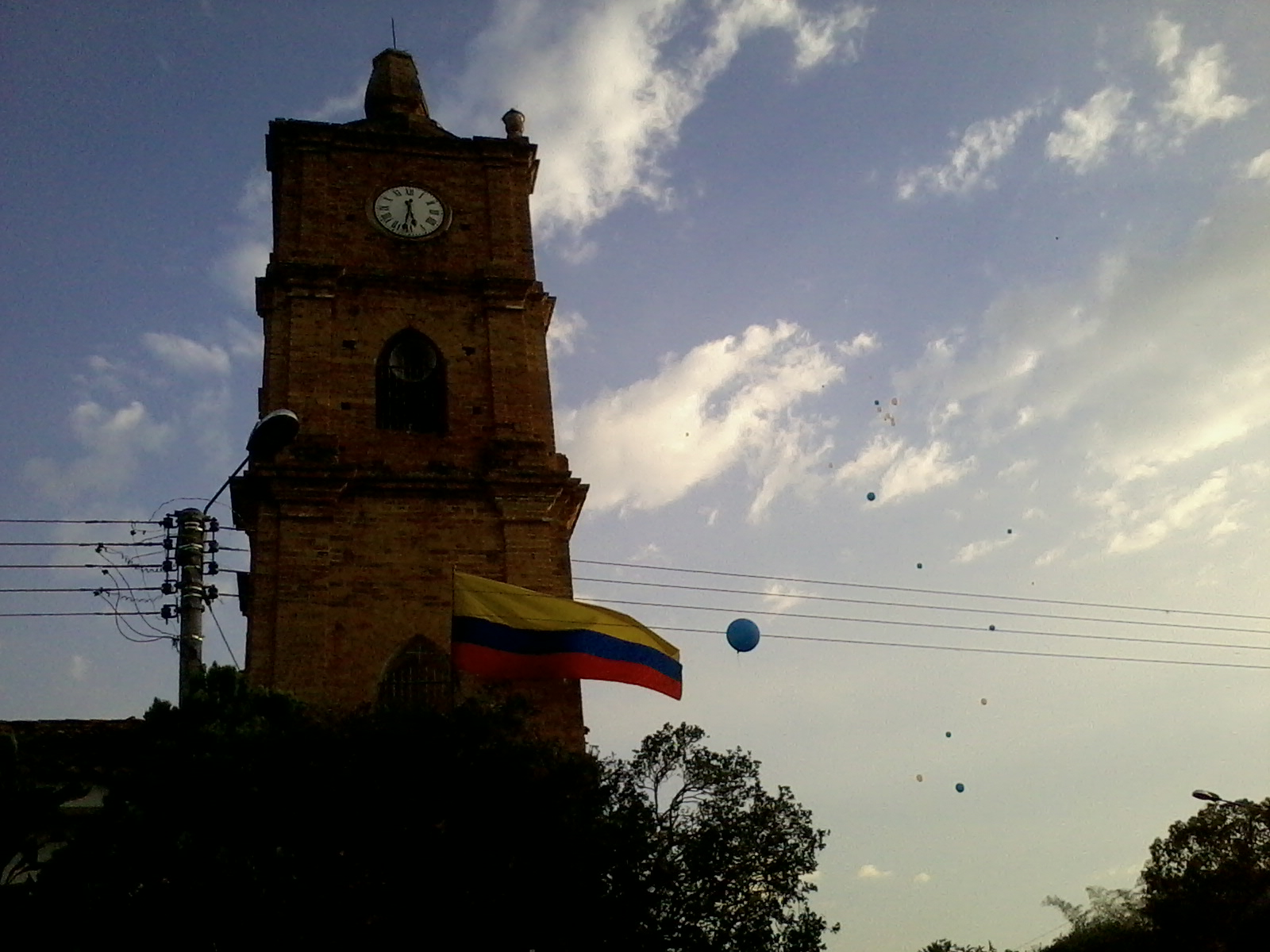 Santuario de La Niña María